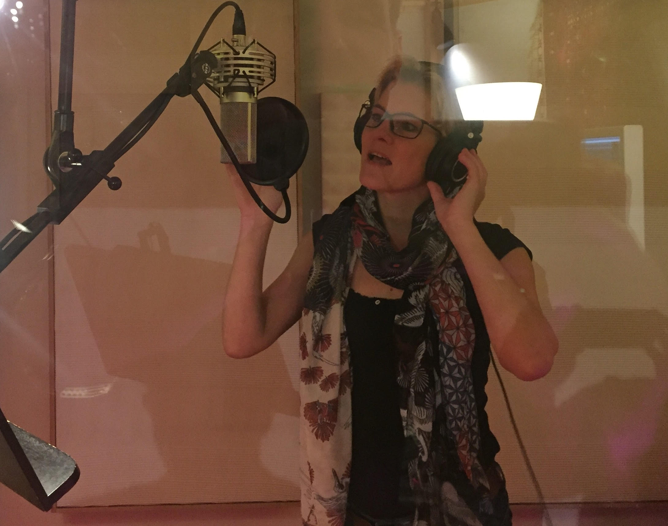 Anja Krabbe